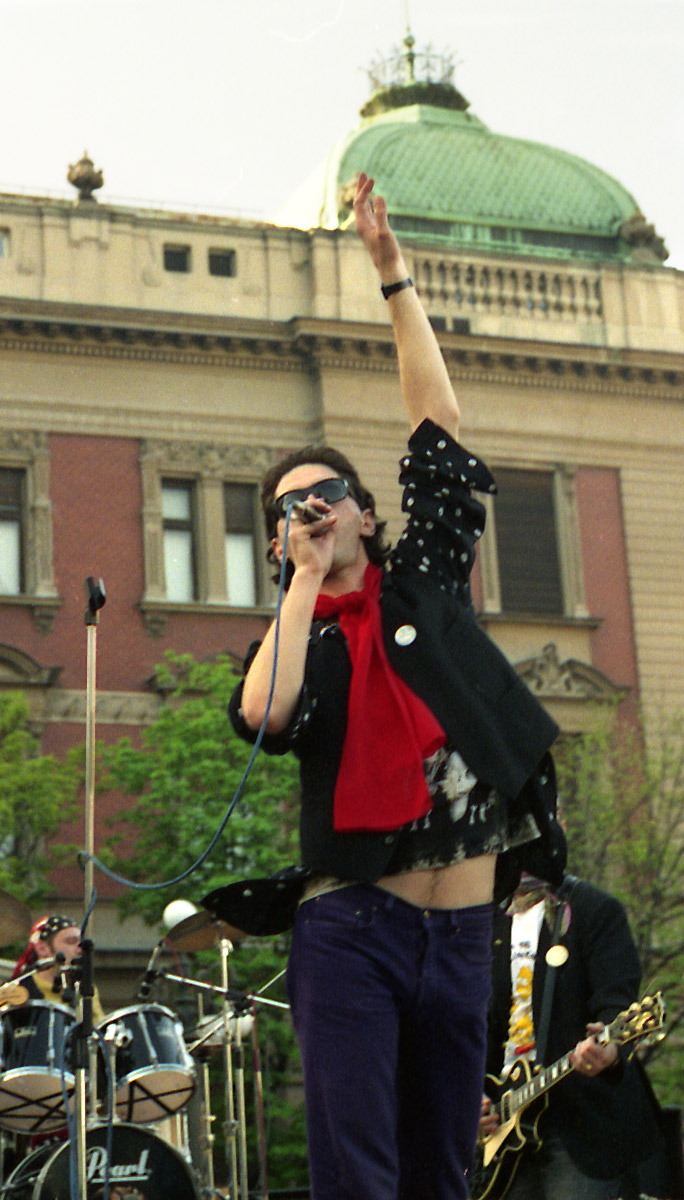 Срђан Гојковић - Гиле на концерту Рим Тути Туки у Београду. Снимио Ранко Томић.